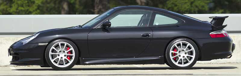 Black Porsche 996 GT3 silhouette2004 996 GT3